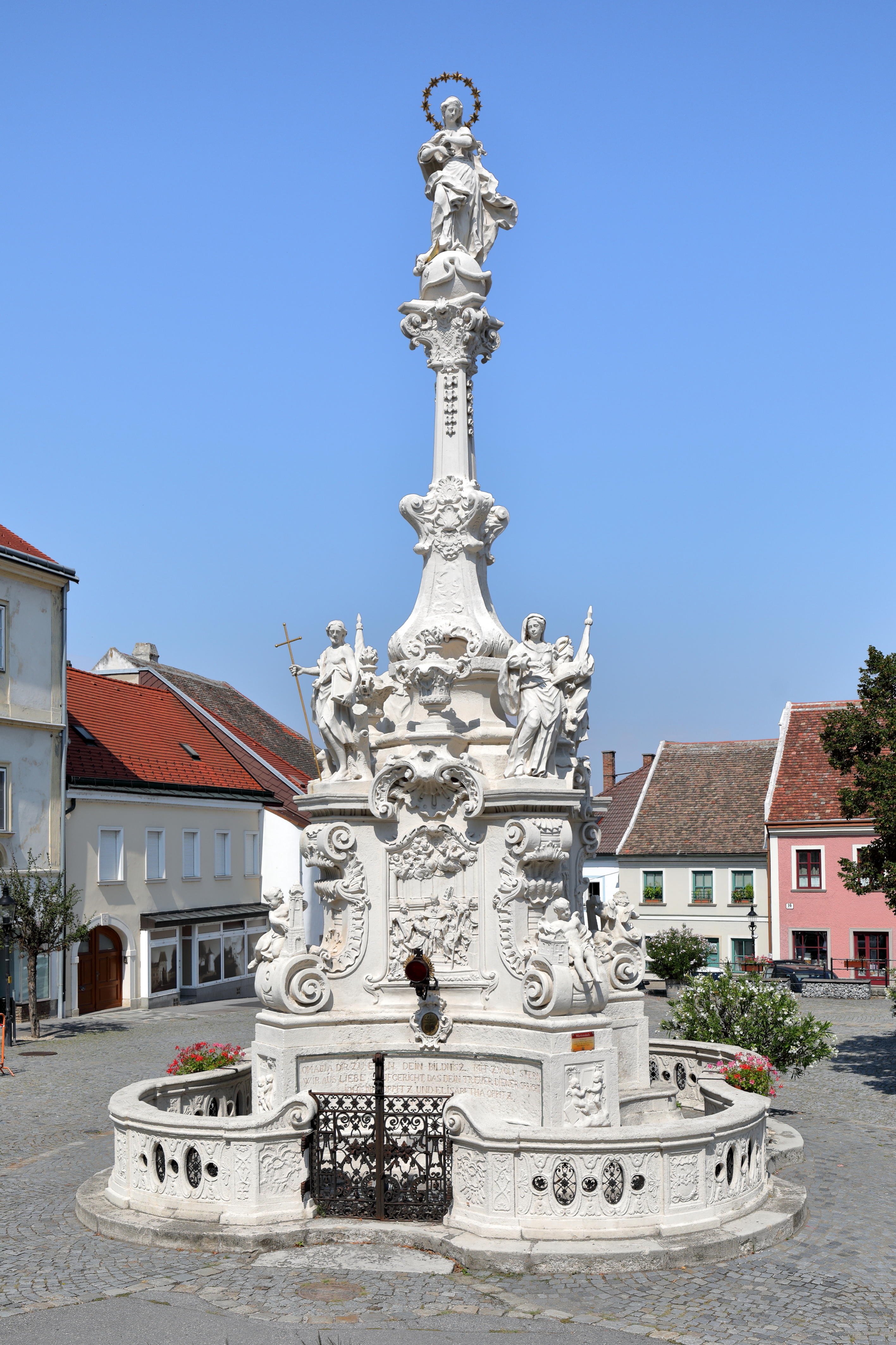 Südostansicht der Mariensäule in der niederösterreichische Stadtgemeinde Hainburg an der Donau. Eine hochbarocke Mariensäule, die von der Stadtrichterwitwe Elisabeth Oppitz 1749 gestiftet und von dem Brucker Bildhauer Martin Vögerl († 1770) gefertigt wurde.